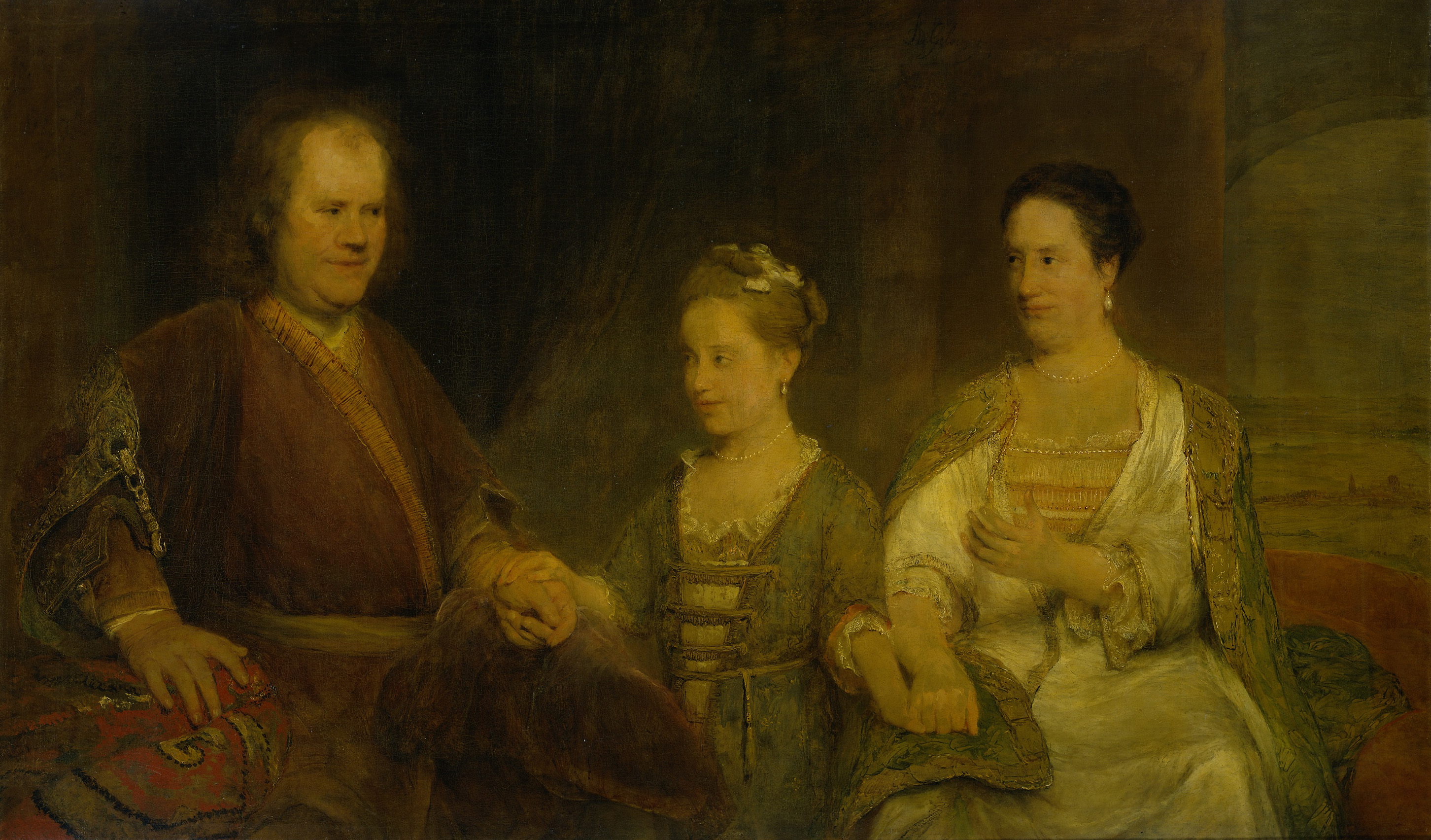 Familieportret van Hermanus Boerhaave, hoogleraar in de geneeskunde te Leiden, met zijn vrouw Maria Drolenvaux en hun dochter Johanna Maria, de latere gravin de Thoms. De personen zijn zittend en hand in hand geportretteerd, in fantasiekleding.